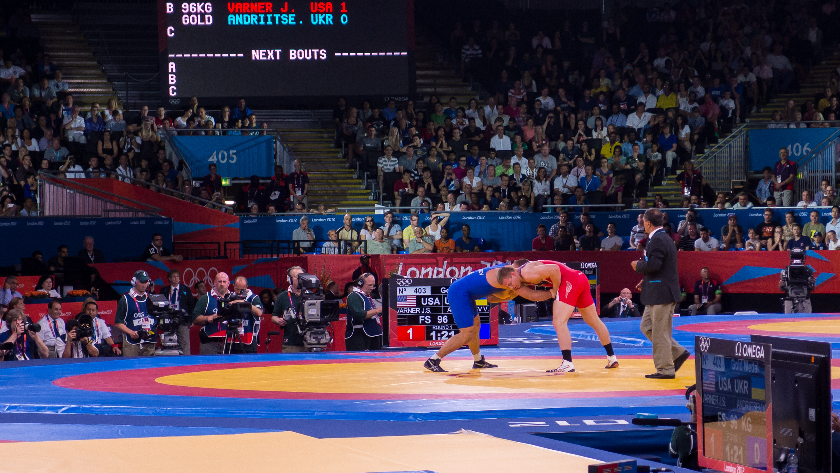 USA v Ukraine